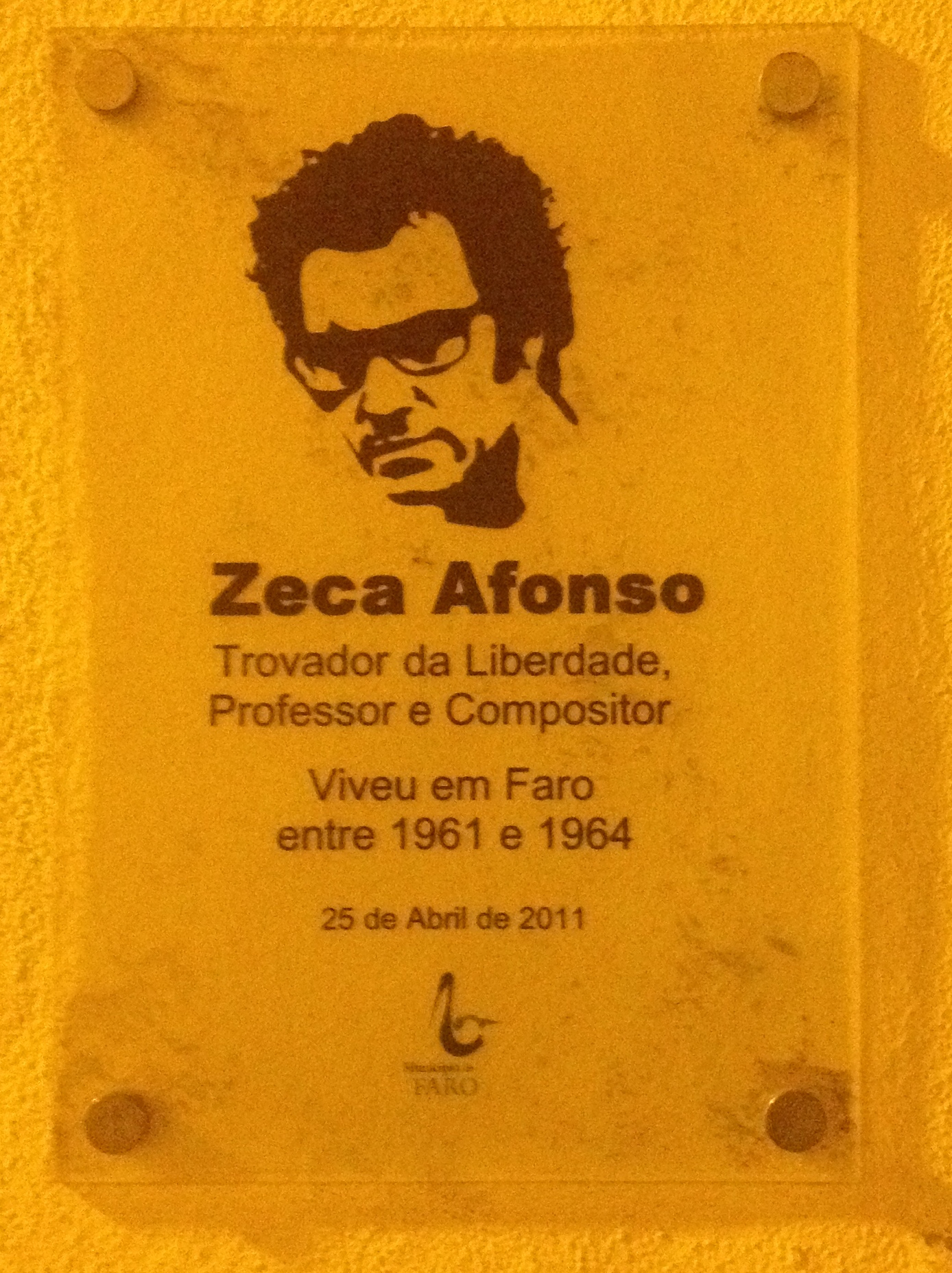 Faro, Portugal.